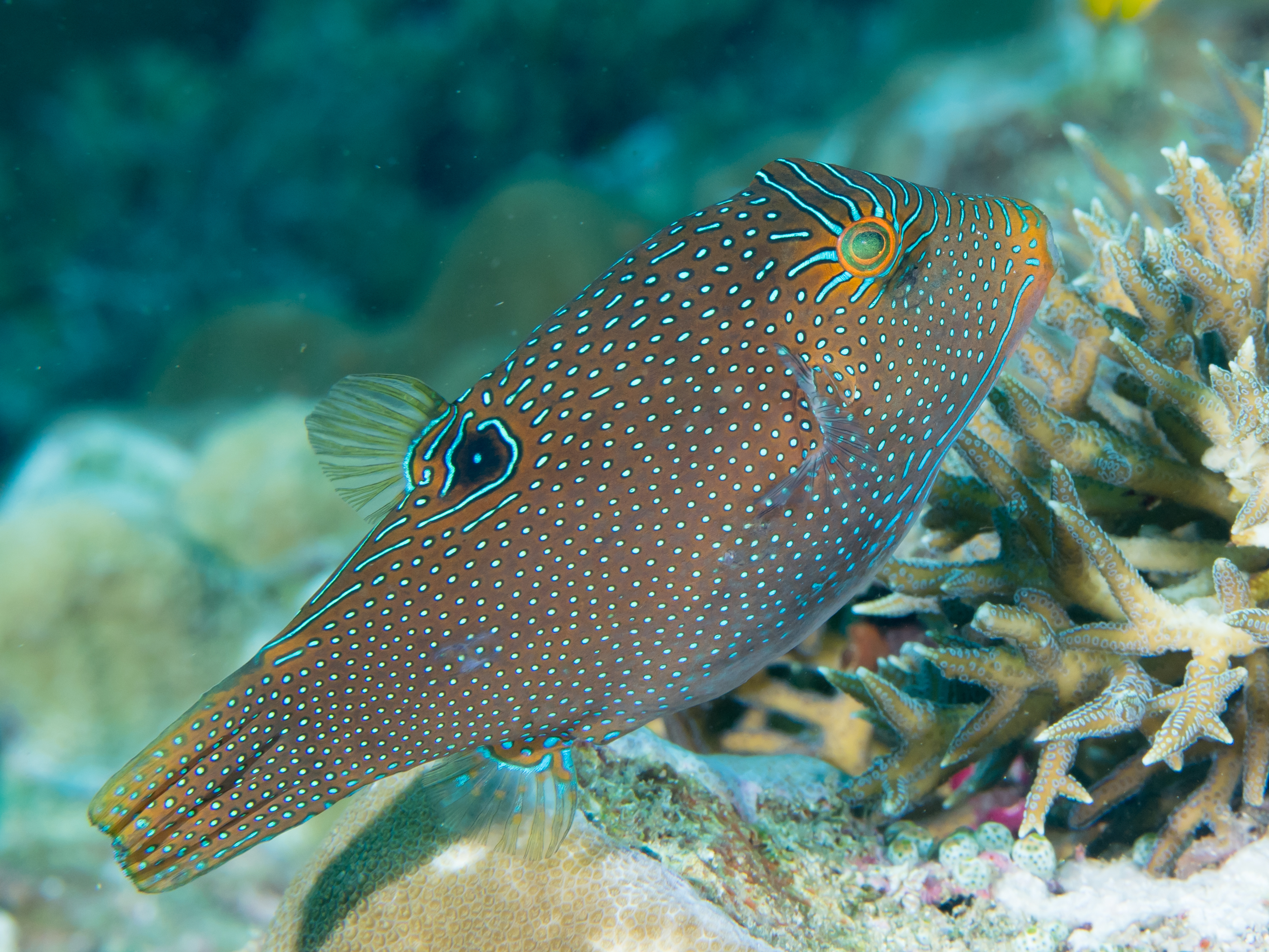 Papuan toby (Canthigaster papua). Raja Ampat